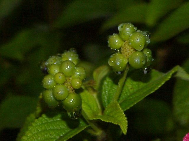 Species: Lantana camara Family: Verbenaceae Image No. 7